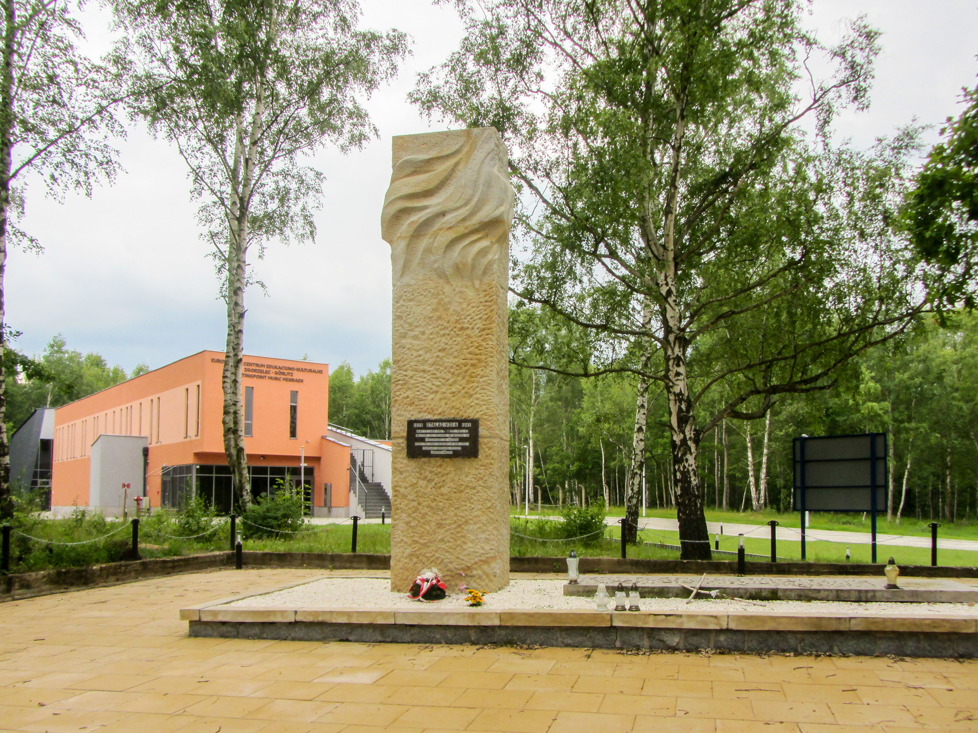 Stammlager VIII A Neubau eines Begegnungszentrums (Europäisches Zentrum für Bildung und Kultur Zgorzelec - Görlitz Meetingpoint Music Messiaen)